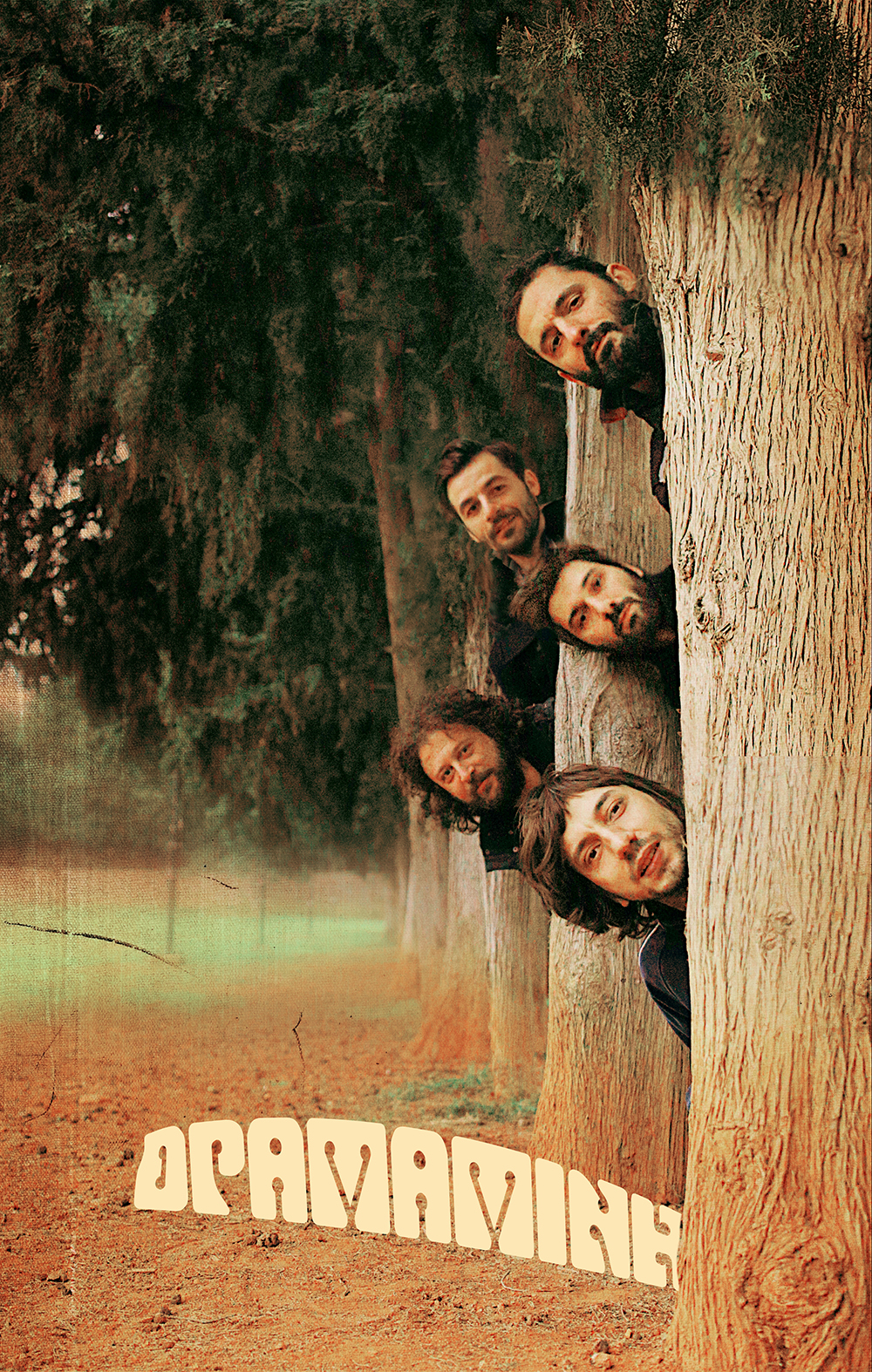 Το συγκρότημα το 2015